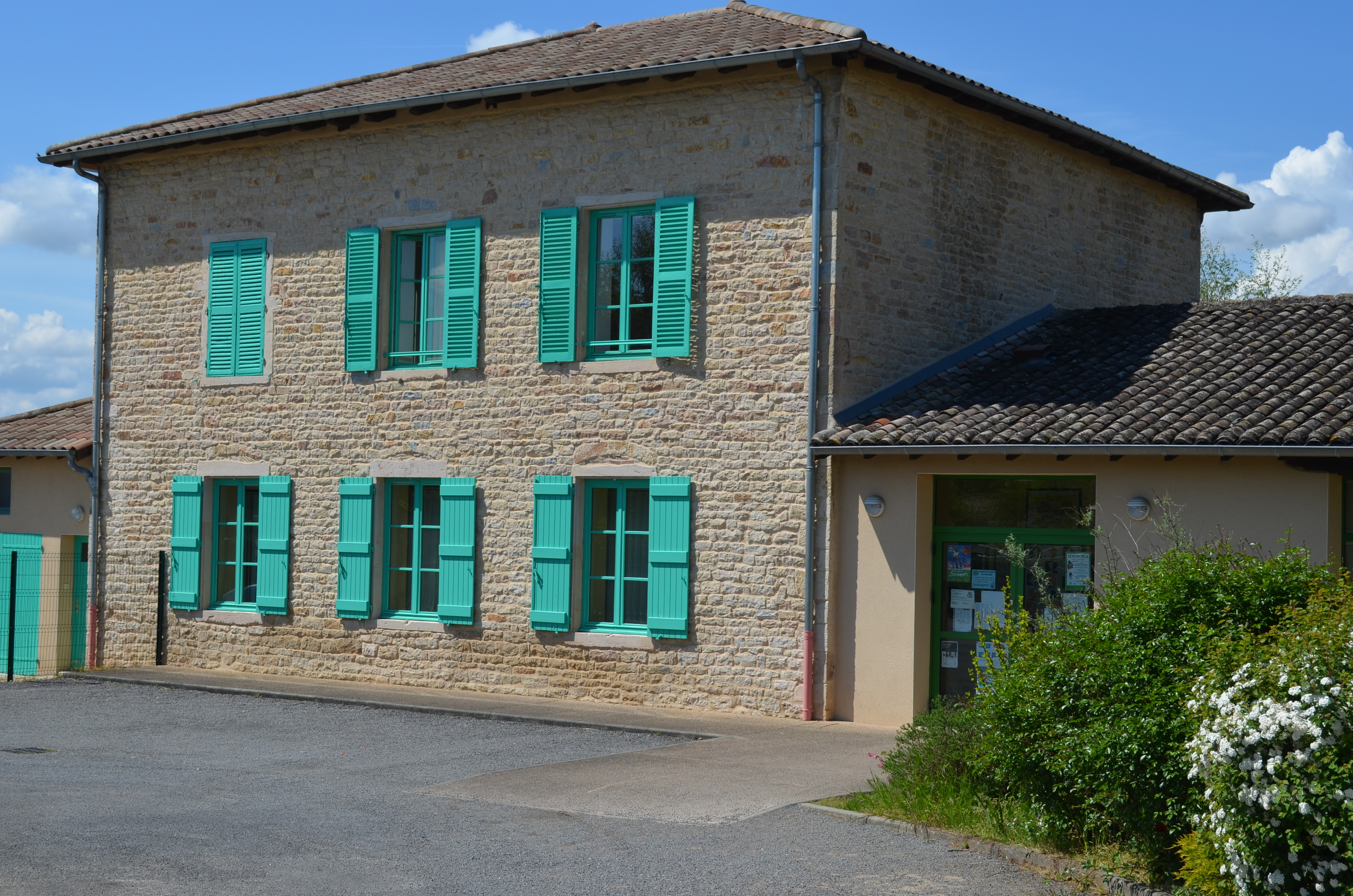 Ecole de Boz